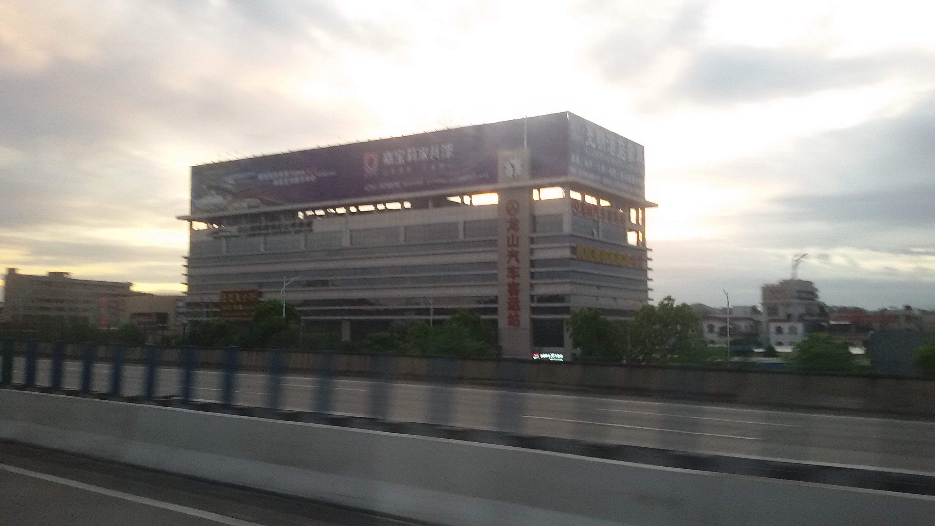 粵語: 龍山汽車客運站